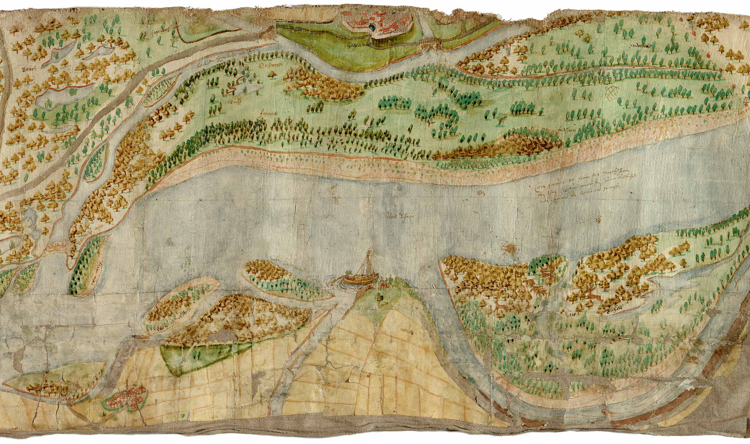 Kurpfälzische Rheinstromkarte, Wilhelm Besserer zugeschrieben, Ende 16. Jahrhundert (GLAK H Rheinstrom Nr. 19), Detail: Hagenbach und Umgebung